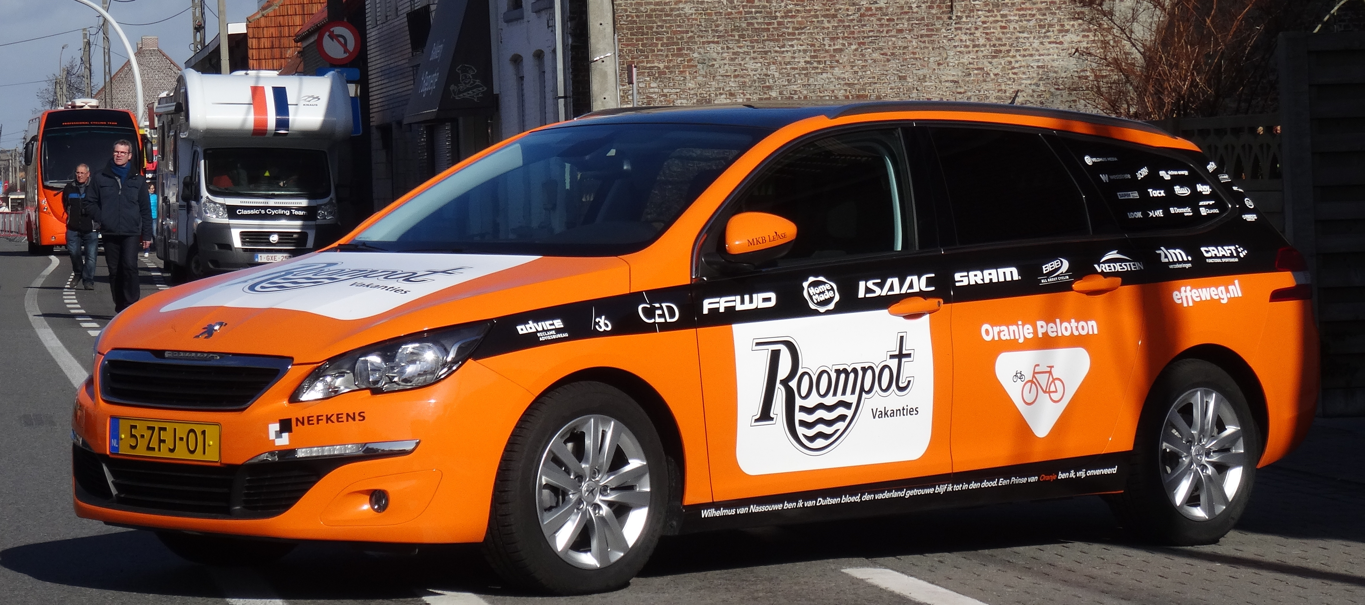 Reportage réalisé le dimanche 1er mars à l'occasion du départ et de l'arrivée de Kuurne-Bruxelles-Kuurne 2015 à Kuurne, Belgique.